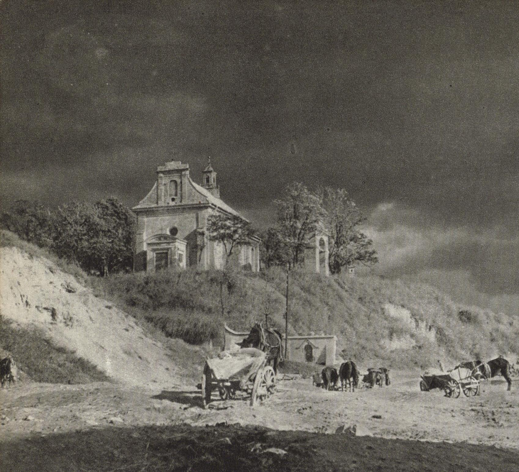 Kościół św. Mikołaja na Czwartku w Lublinie.